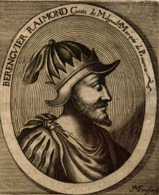 Berenguer Ramon, Count of Provence